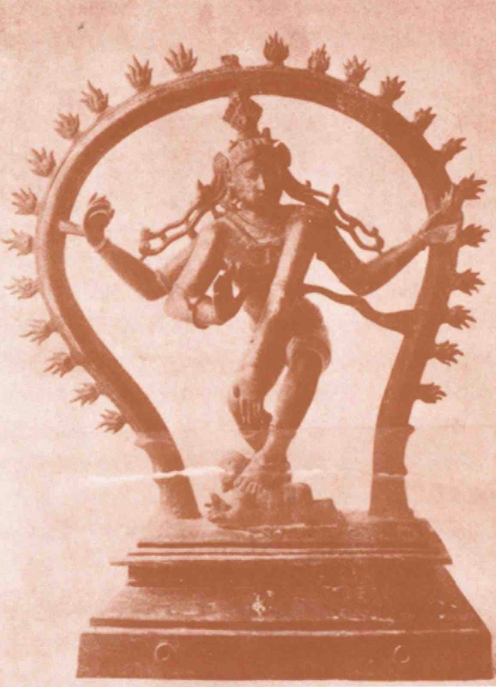 ภาพเทวรูปศิวนาฏราช ศิลปะอินเดียตอนใต้